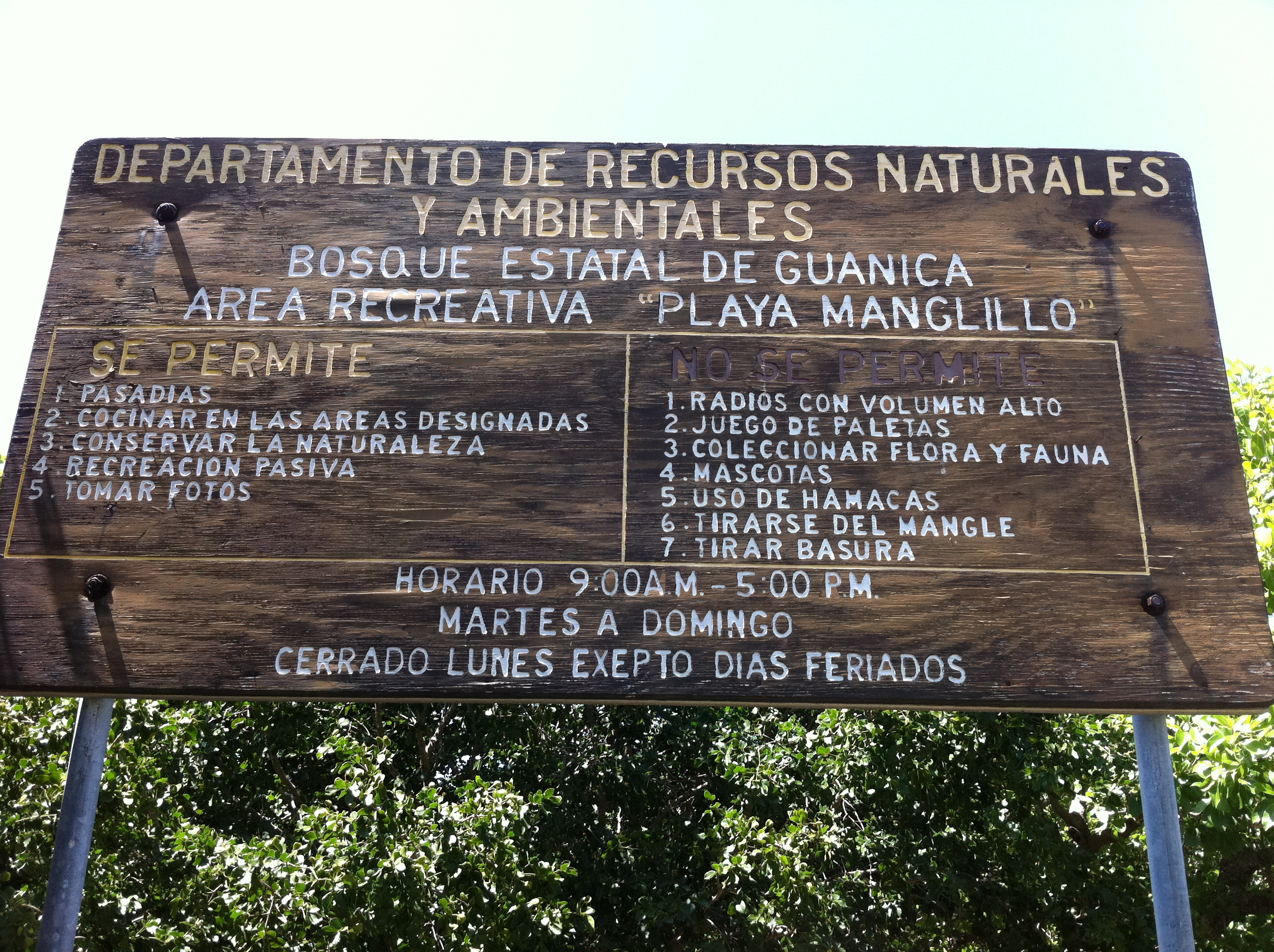 Playa Manglillo